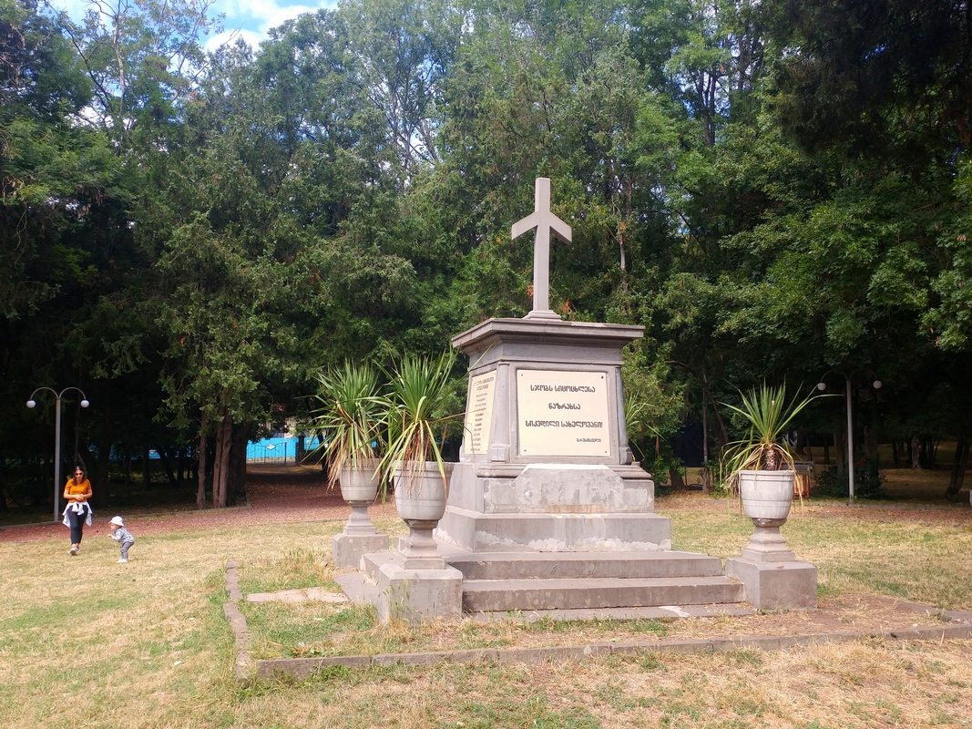 Мемориал Гавриле Сидорову в Манглиси, на территории бывшего плаца. В советское время переделан в памятник неизвестному солдату, в постсоветское - в памятник героям Грузии.